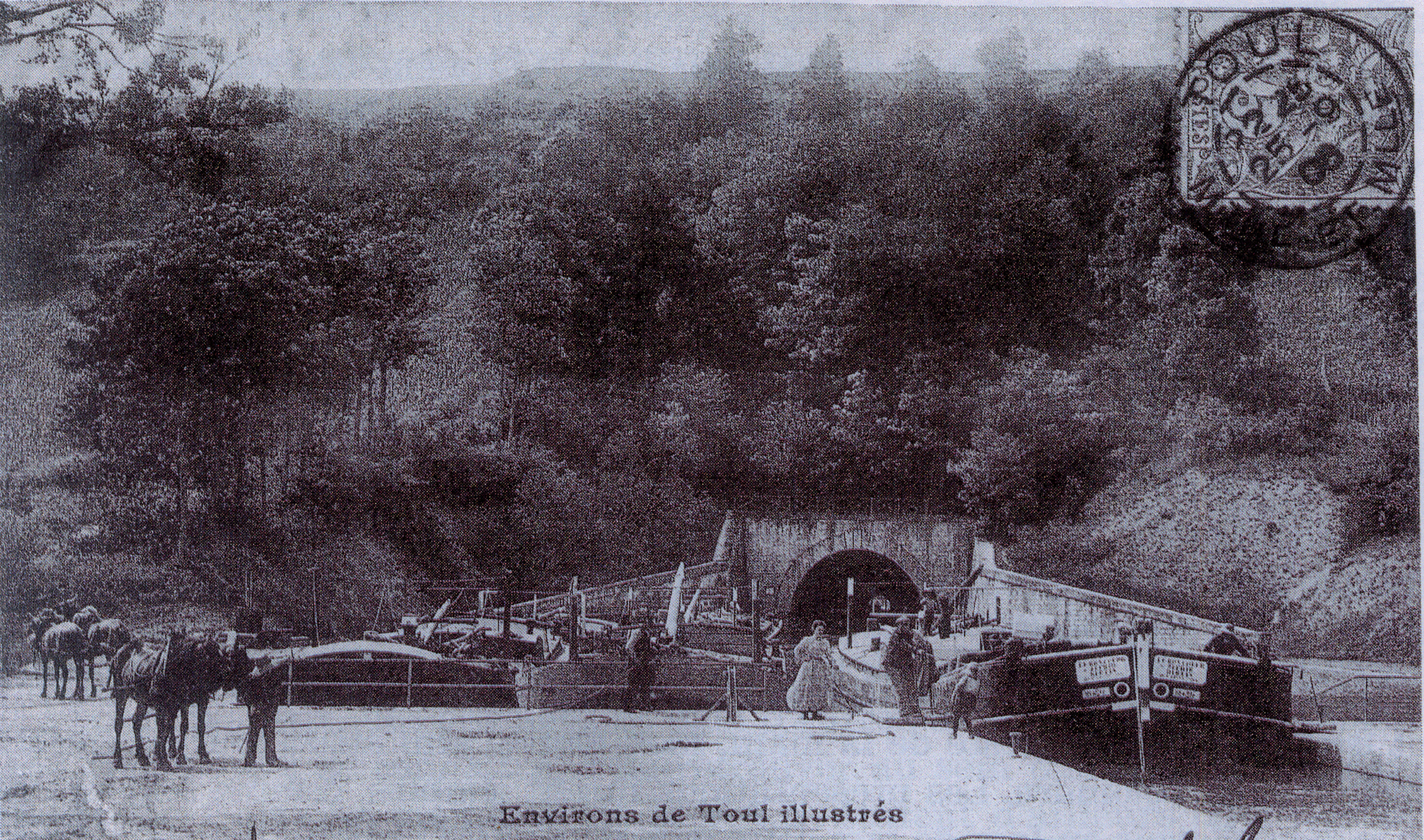 Numérisation d'une carte postale de 1906 (éditions herbeval)